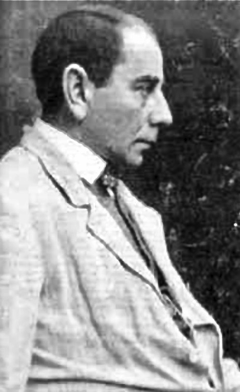 Moritz Heimann (1868–1925), Schriftsteller, Redakteur und Cheflektor des S. Fischer Verlages